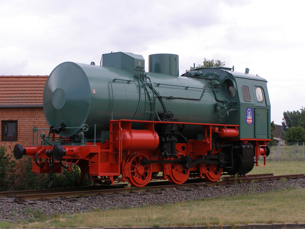 Aufgearbeitete Dampfspeicherlok im Henkel-Werk (Museum) Genthin